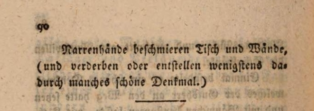 Schulgesetze des Lehrers Anton Heilingbrunner in Wasserburg,1828 in München als zweite, verbesserte Auflage veröffentlicht. Zitat aus Seite 90.veröffentlicht.